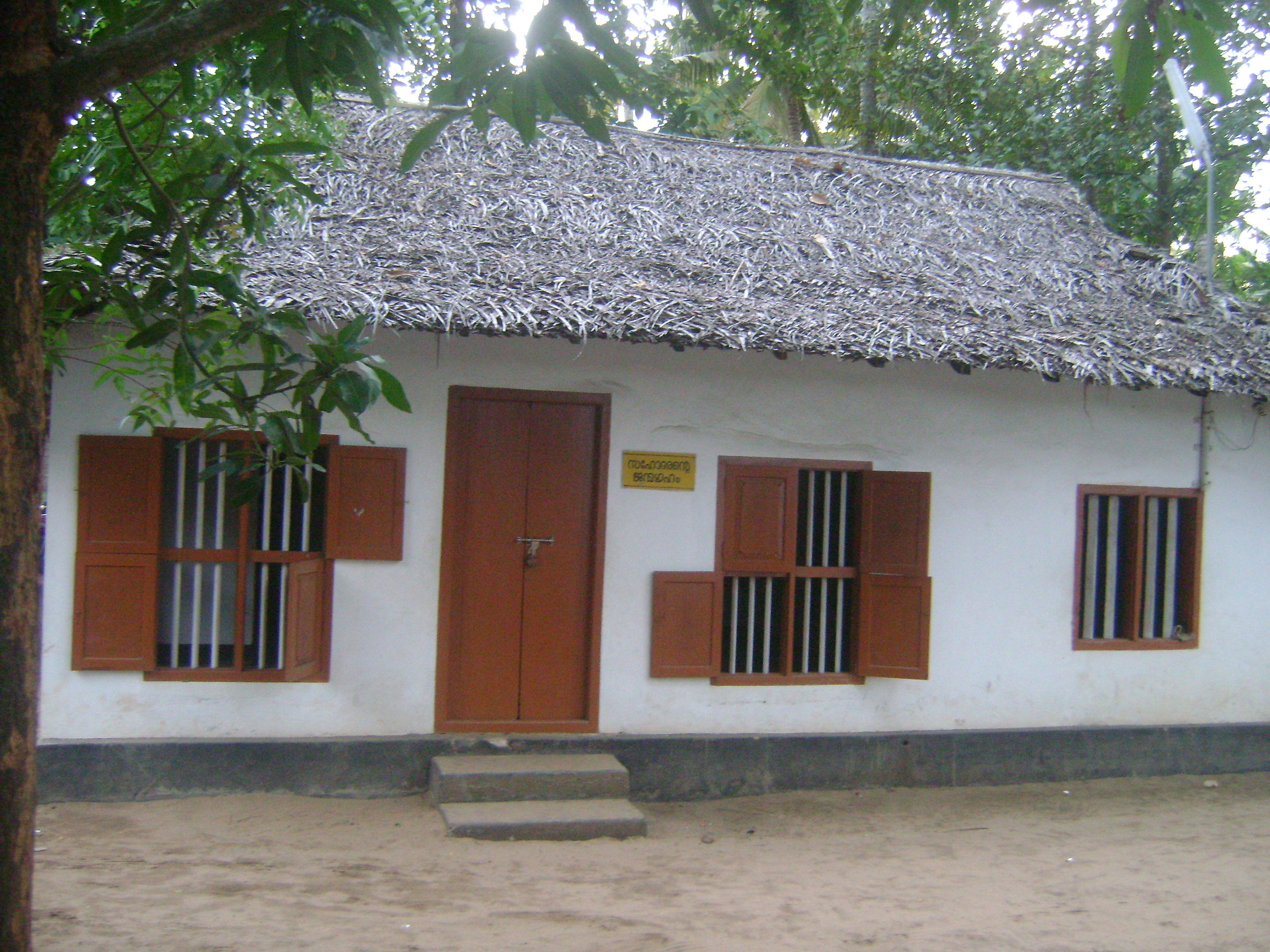 മിശ്രഭോജനം നടത്തി ജാതിവ്യവസ്ഥയ്കെതിരെ പോരാടിയ ,ജാതി വേണ്ട മതം വേണ്ട ദൈവം വേണ്ട മനുഷ്യന് എന്ന് ലോകത്തോടരുള്‍ ചെയ്ത ധീര വിപ്ലവകാരി സഹോദരന്‍ അയ്യപ്പന്റെ ചെറായിയിലെ ജന്മഗൃഹം